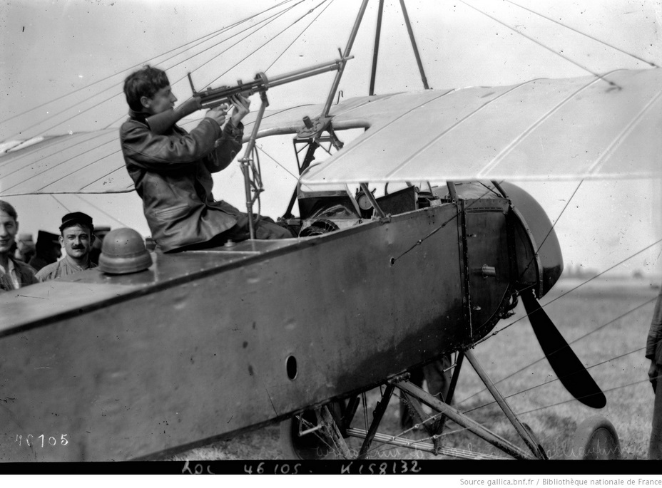 Georges Guynemer dans son Morane Saulnier, c'est dans cet avion qu'il remporta sa 1ère victoire avec Charles Guerder le 19 juillet 1915